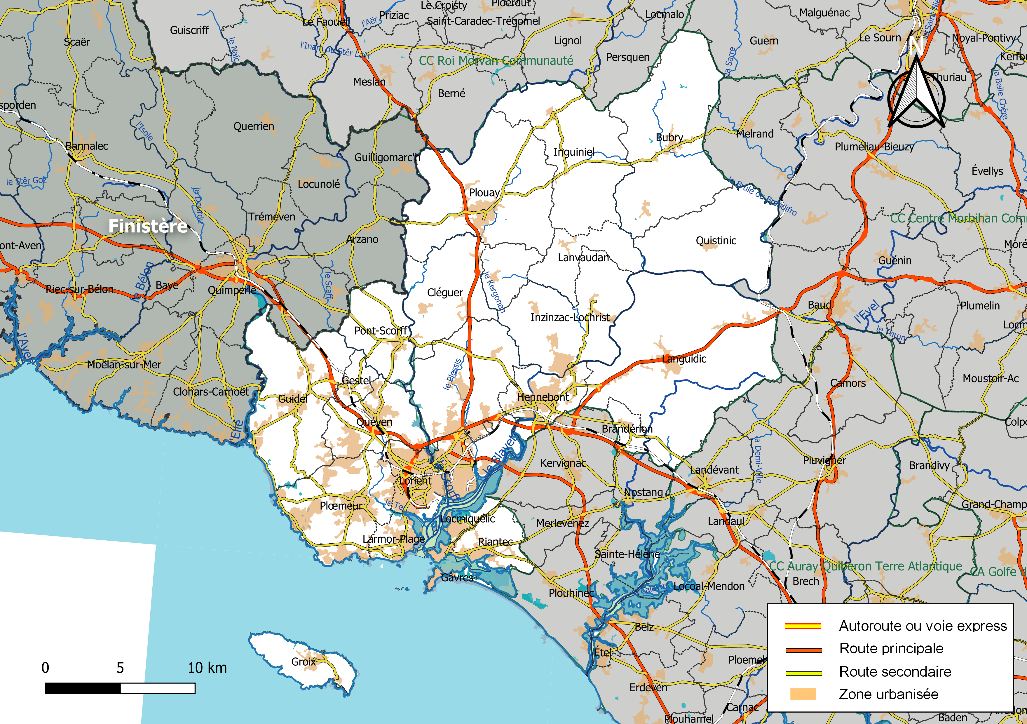 Carte géographique de l'intercommunalité Lorient Agglomération, département du Morbihan, France. Composition au 1er janvier 2019.